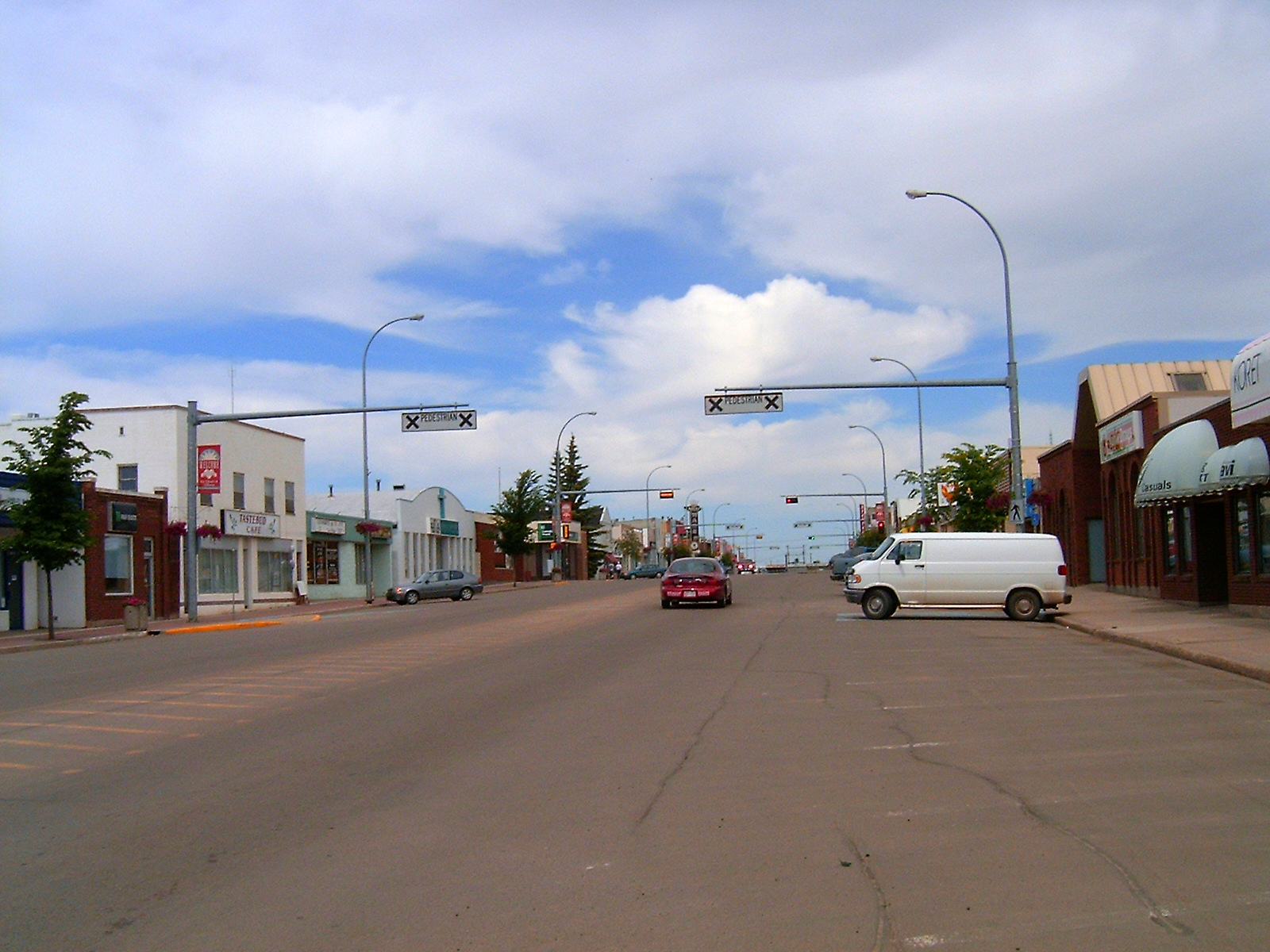 Mainstreet Stettler, Alberta}